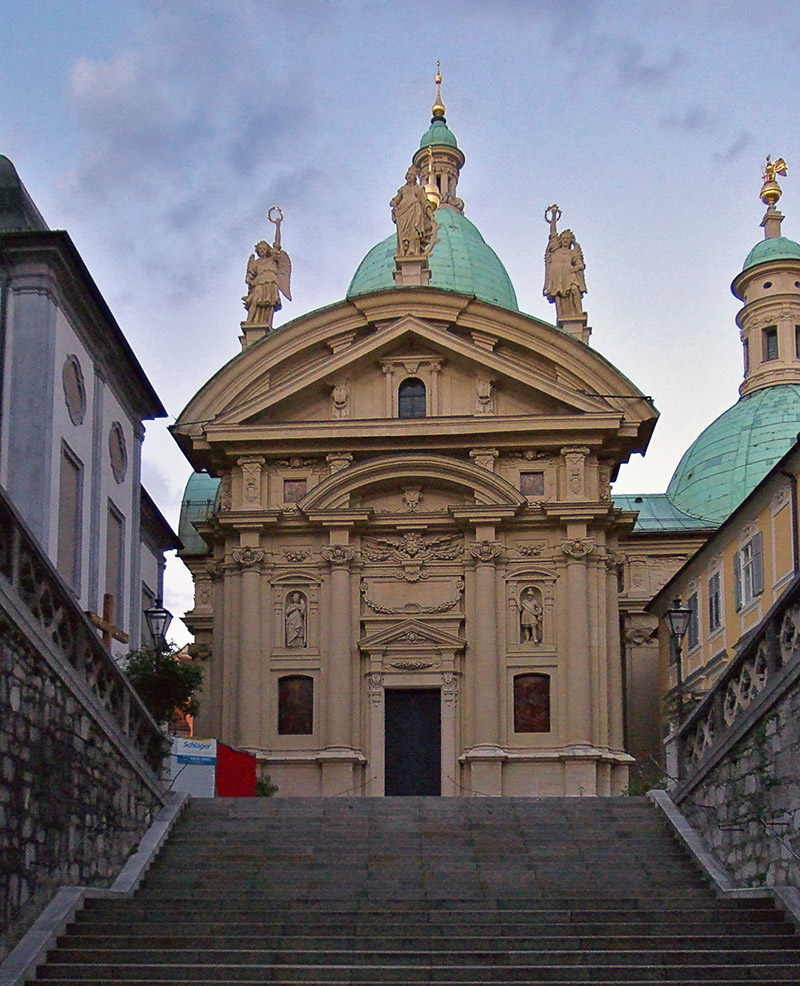 Mausoleum neben den Grazer Dom